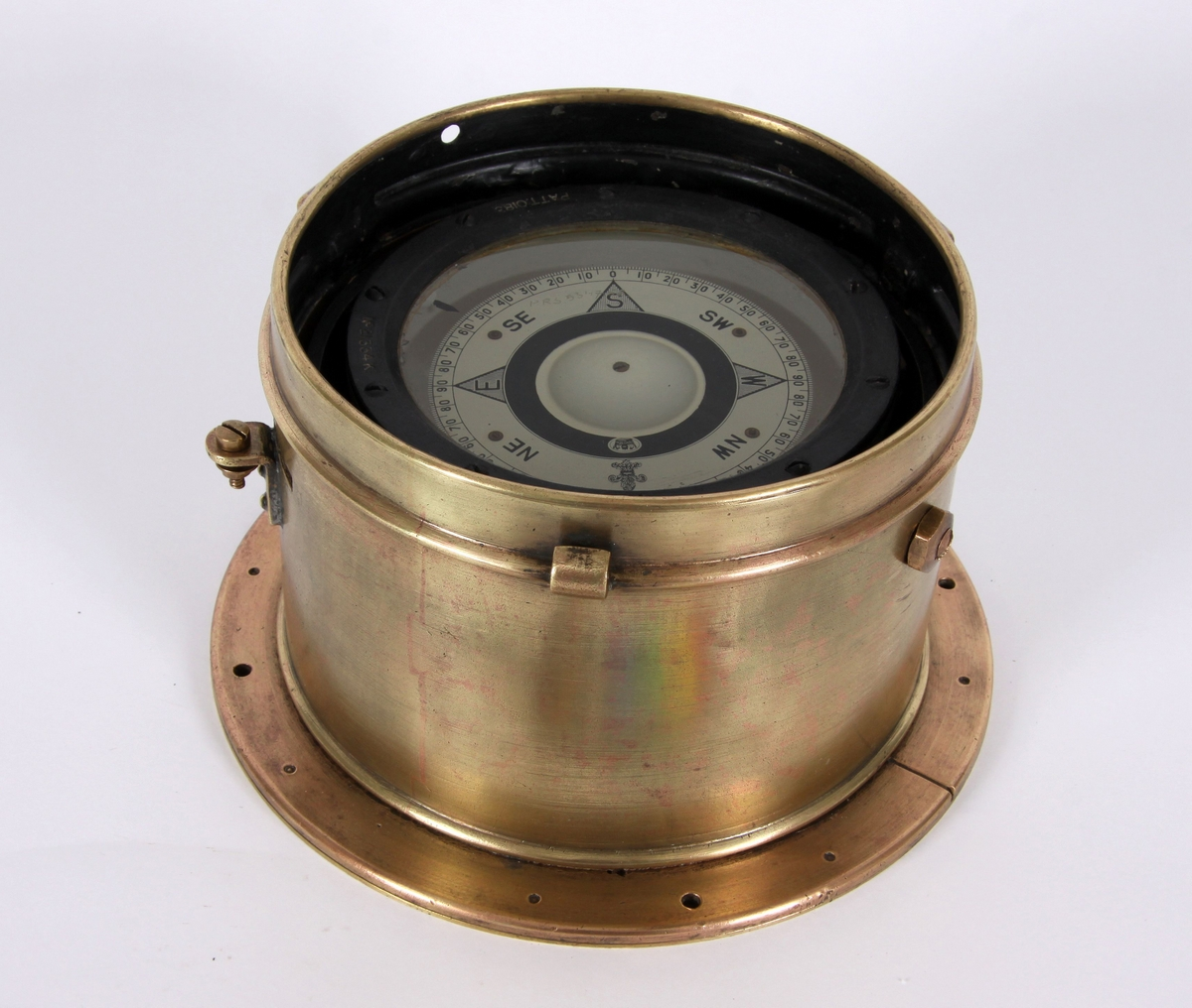 Kompas mokry, oryginalnie wypełniony płynem (gliceryna, alkohol), zawieszony na przegubie Cardana, wchodzący w skład oryginalnego wyposażenia jachtu „Opty” podczas samotnego wokółziemskiego rejsu Leonida Teligi. Leonid Teliga (1917-1970) jako pierwszy Polak w historii samotnie na jachcie „Opty” opłynął Ziemię. Trasę z Casablanki przez Atlantyk, Kanał Panamski, Pacyfik, Ocean Indyjski, wokół Przylądka Igielnego do Casablanki przebył w latach 1967-1969.